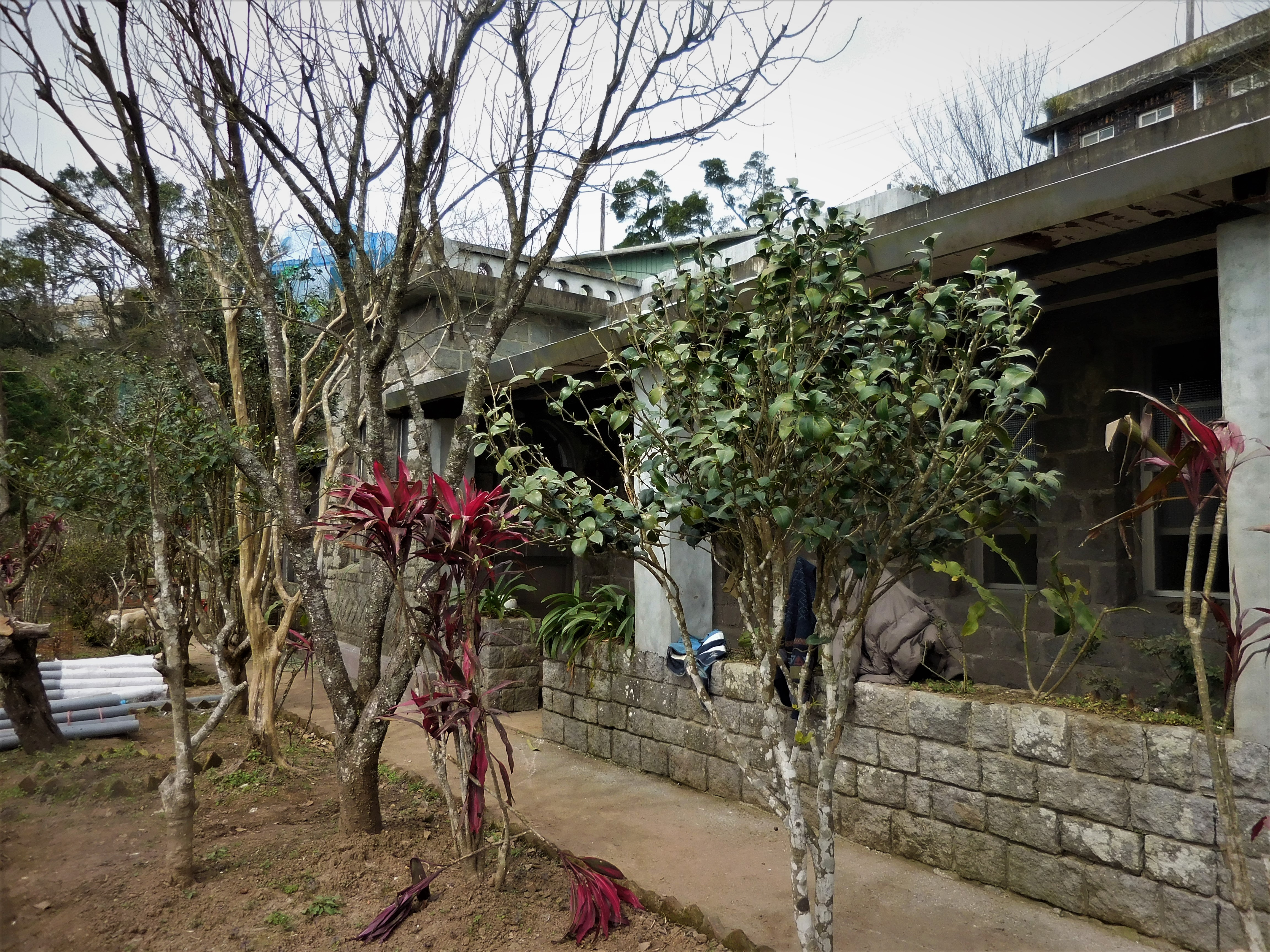 閻錫山故居閻錫山晚年因懷念家鄉，並基於軍事防衛需要，選擇可居高臨下俯視淡水河口與台北盆地的防風山坡上，建造石頭屋「種能洞」及「紅磚屋」。